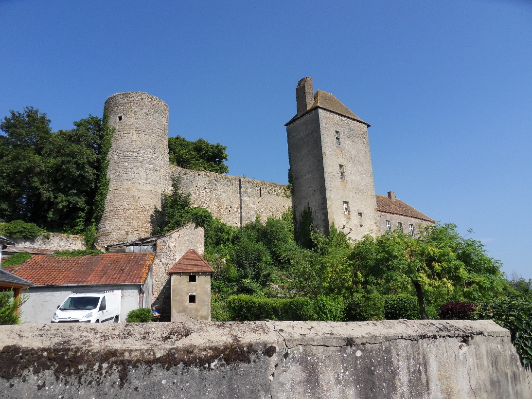 Château de Chavroches (Inscrit) .